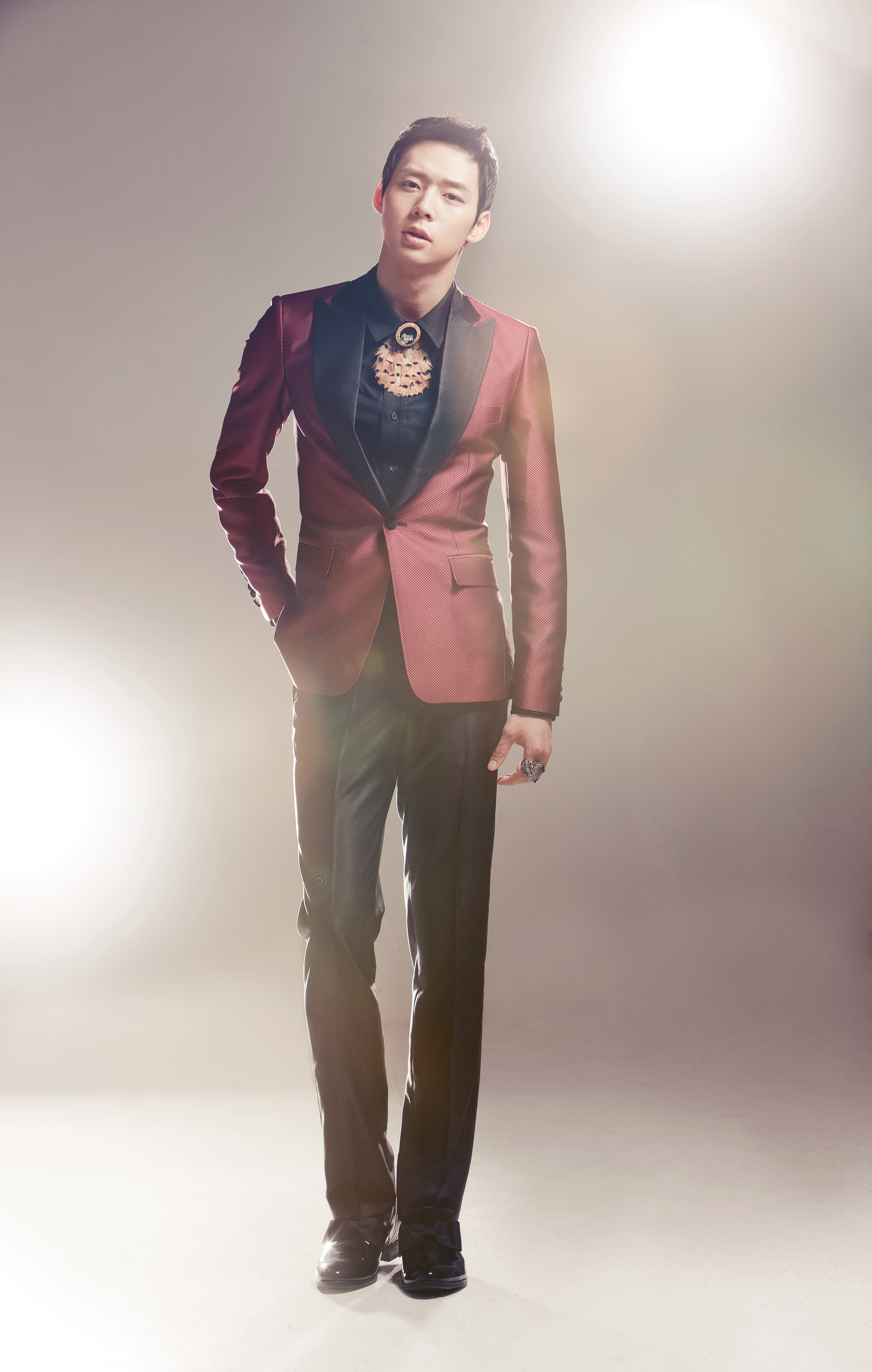 LG 옵티머스 Q2 광고 사진 - JYJ